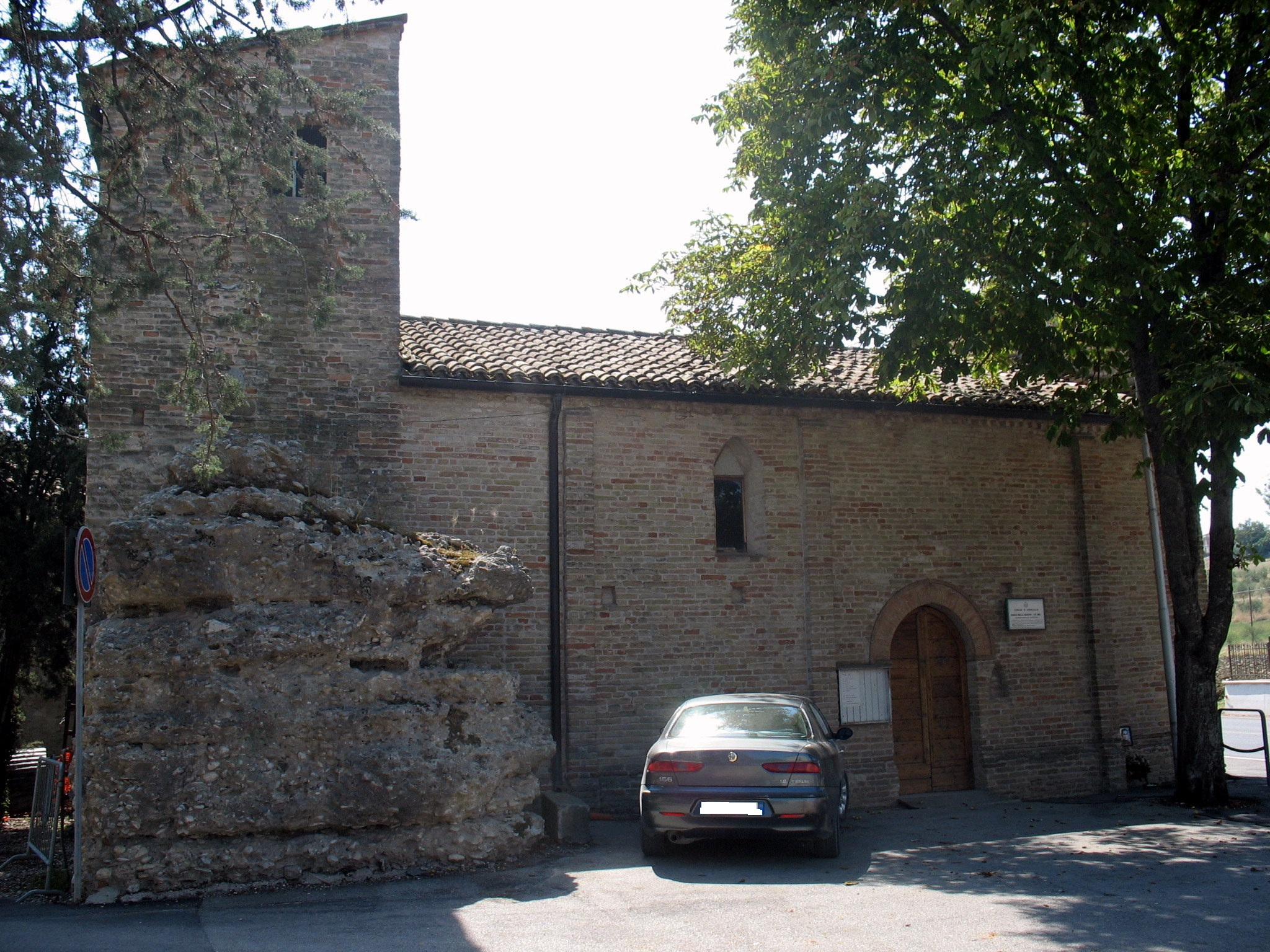 Lato e rudere romano sul quale si ergeva la prima edicola della Chiesa della Maestà